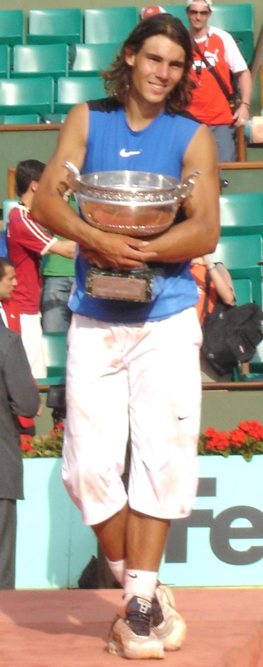 2006 Roland Garros Champion Rafael Nadal